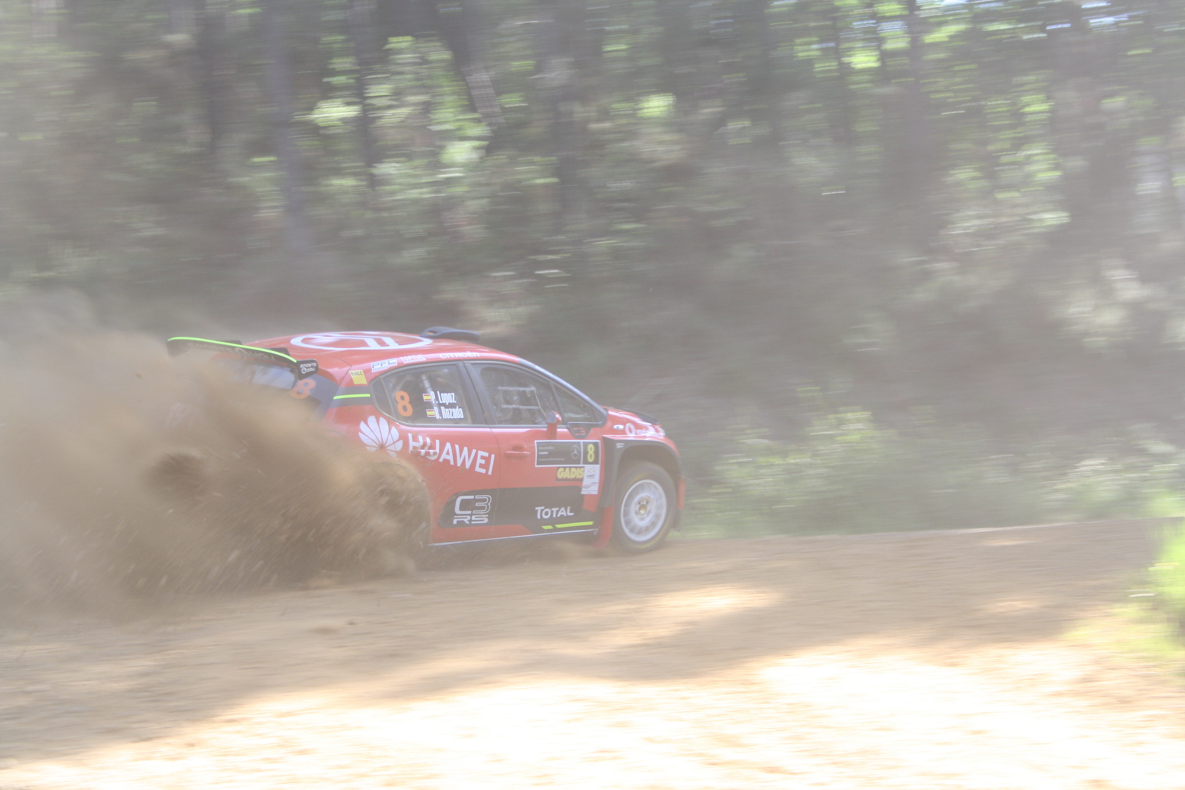 Rally Terra da Auga. Cuarta prueba del campeonato de España de rallies de tierra 2019 y tercera del Súper Campeonato de España de Rally.